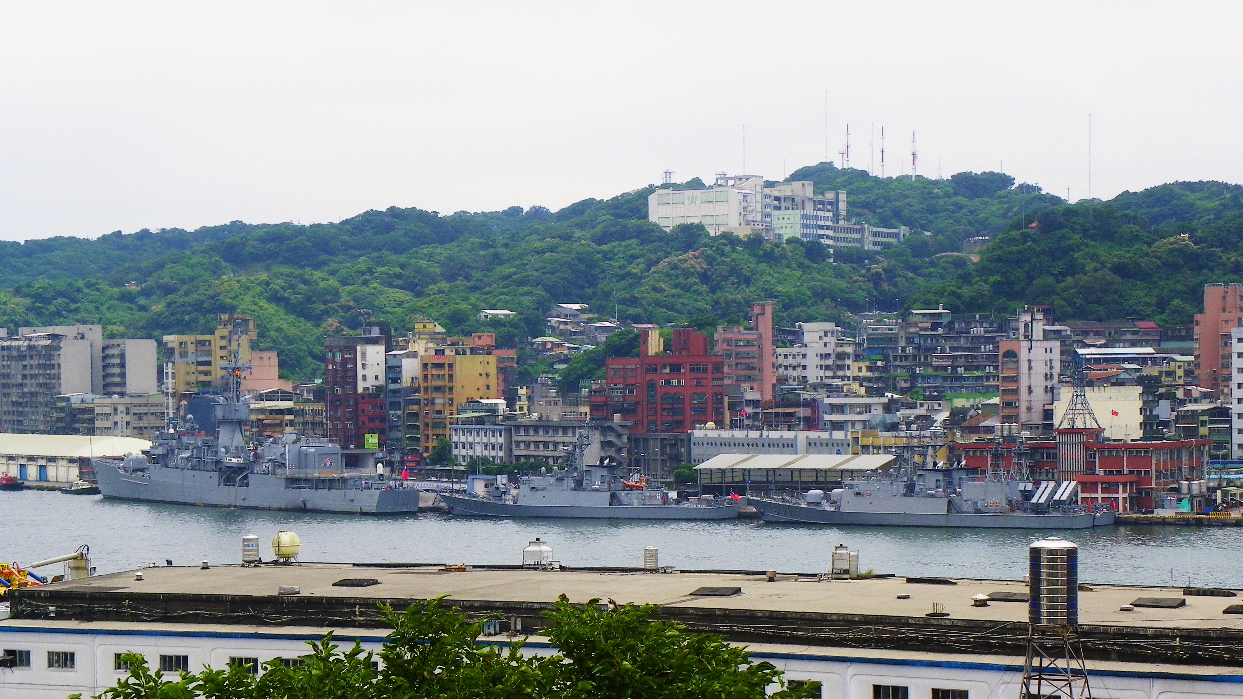 停泊於基隆港東五號碼頭的中華民國海軍巡防艦濟陽（FFG-932），中間是錦江級巡邏艦鄱江艦（PGG-614），右側是湘江艦（PGG-611）與另一艘錦江級巡邏艦。